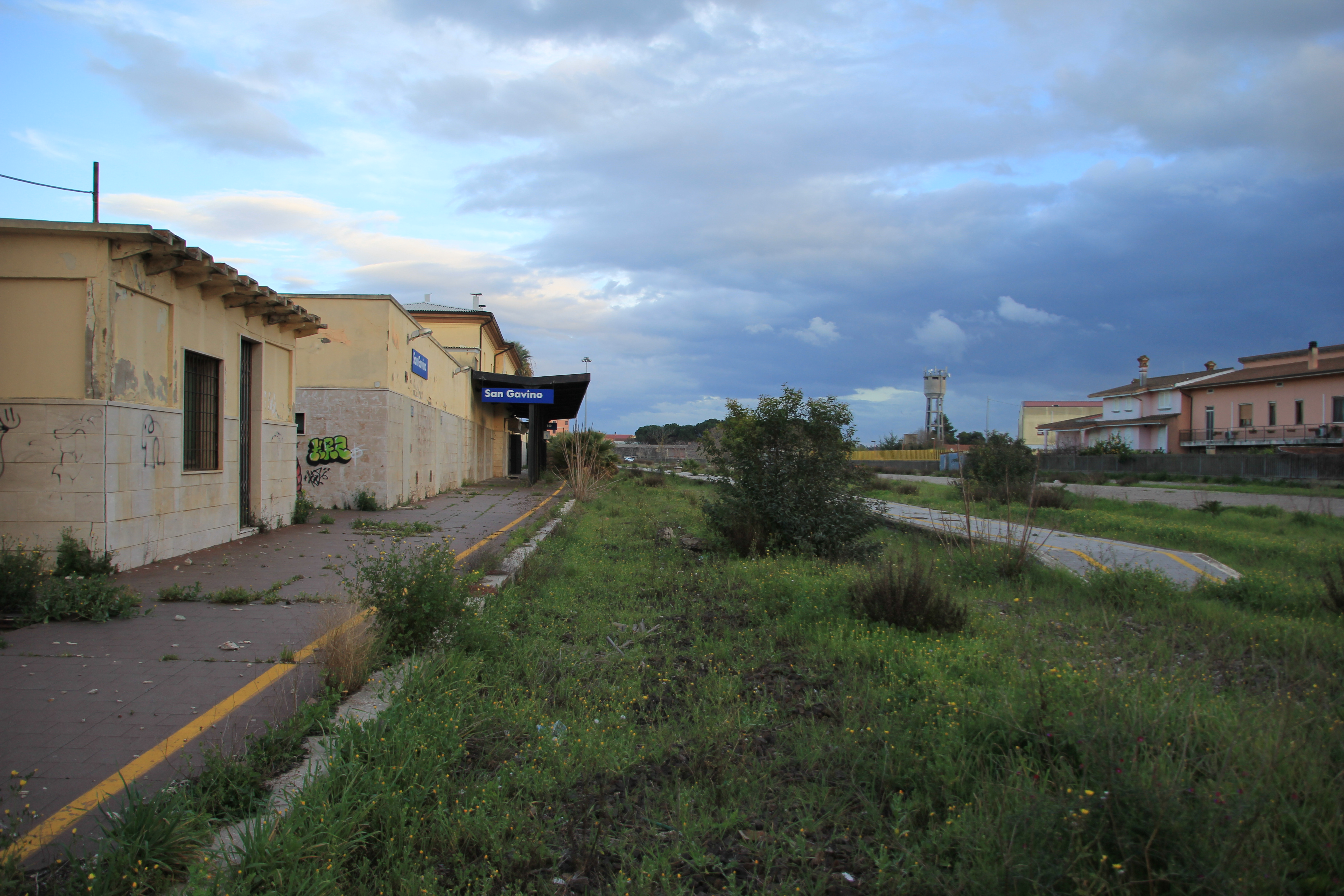 San Gavino Monreale - Stazione ferroviaria del 1871